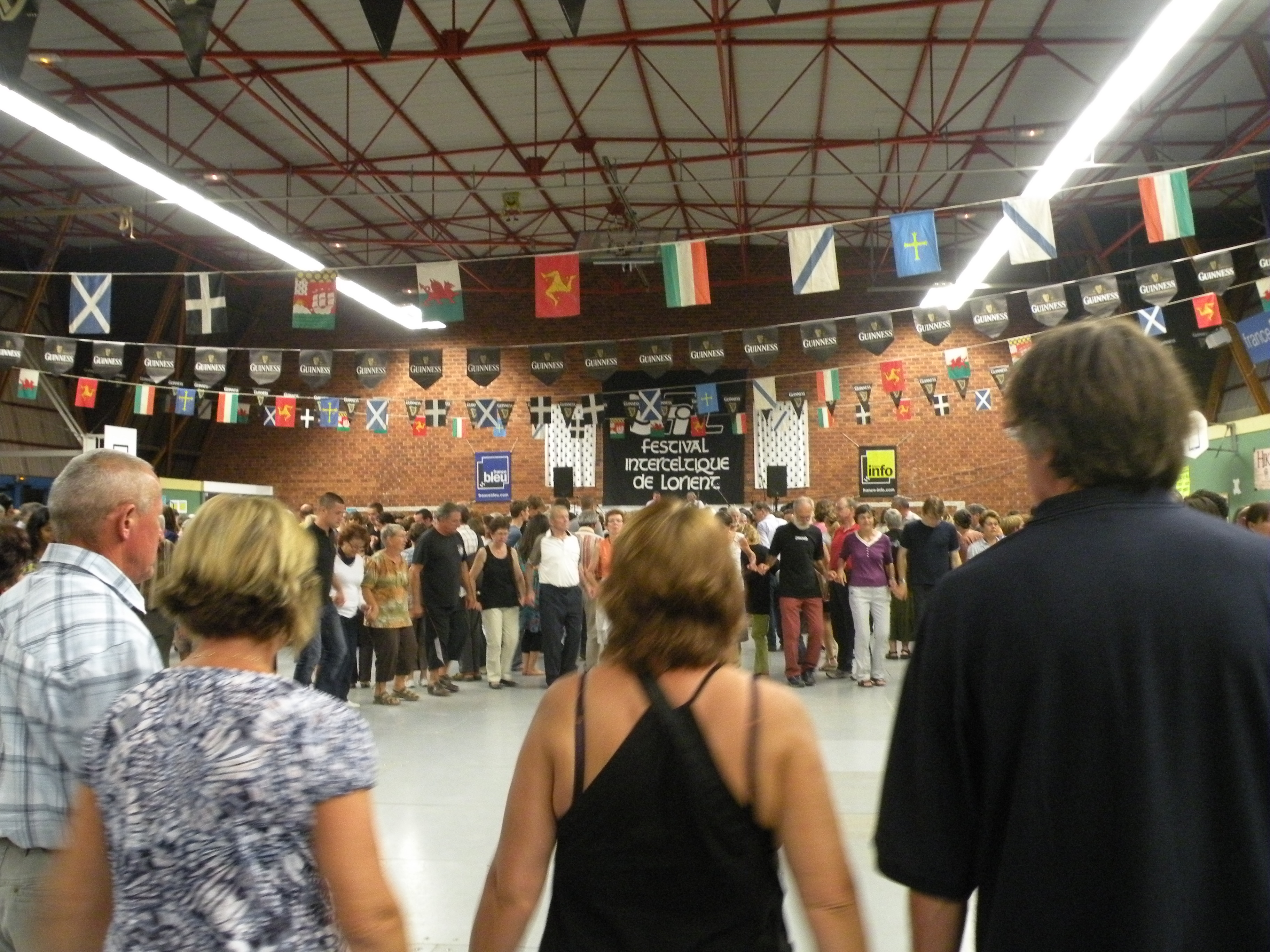 Fest-noz er sal Carnot, Emvod ar Gelted, An Oriant, 14 a viz Eost 2010.